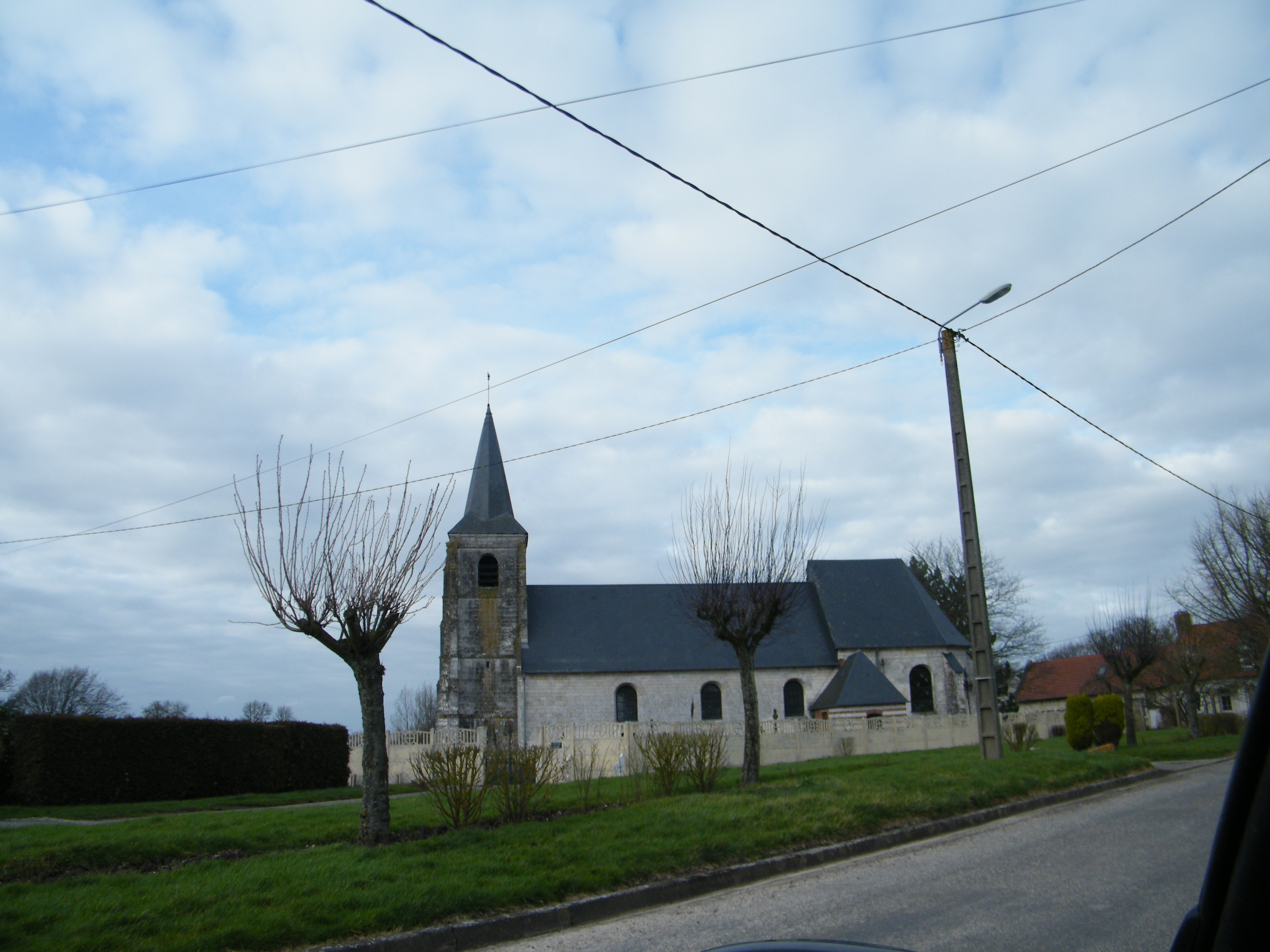 Église Saint-Pierre de Conteville (Somme).